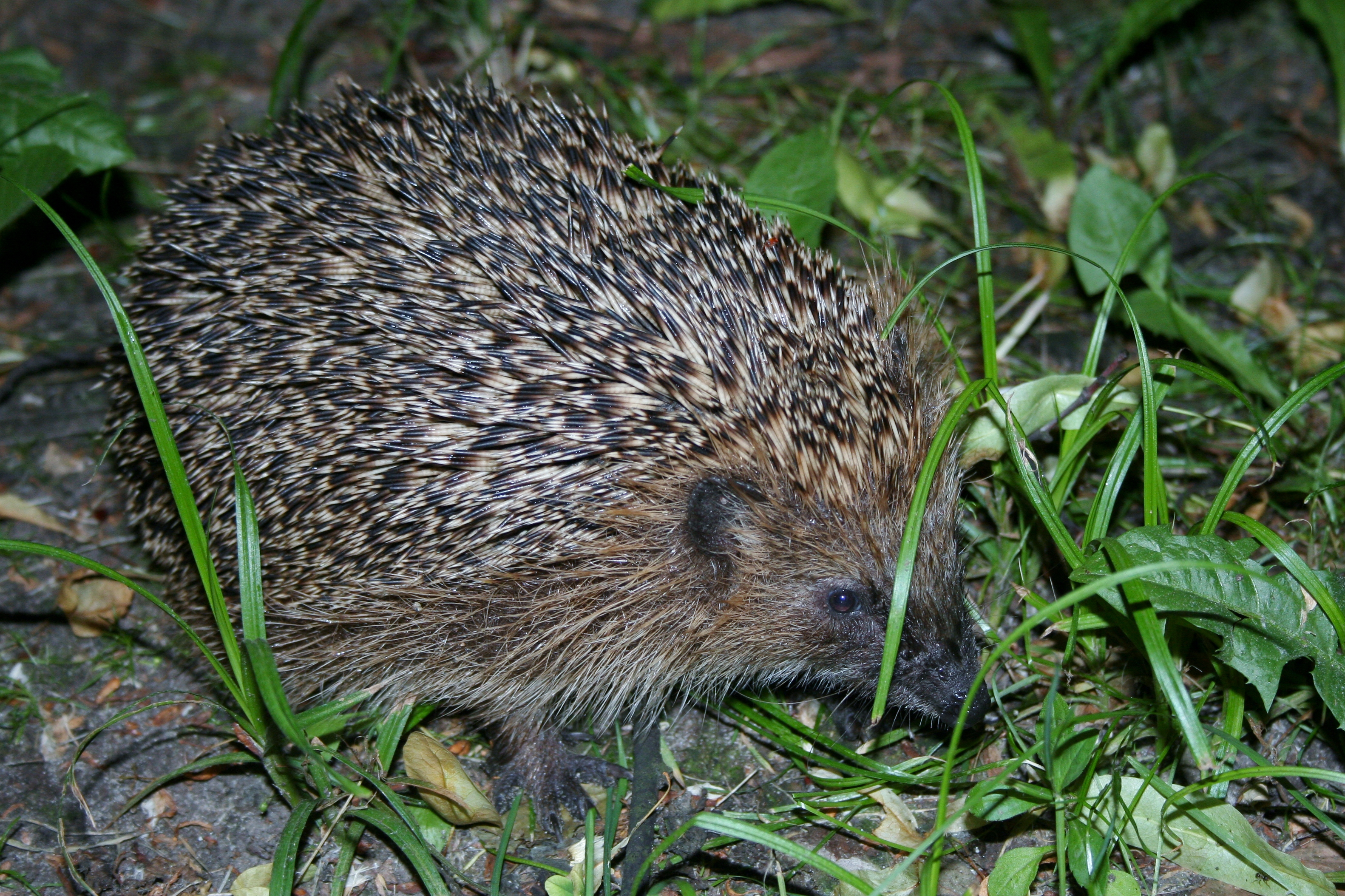 Jeż wschodni (Erinaceus roumanicus) z kleszczem w małżowinie usznej. Fotografia wykonana nocą w Katowicach os. Ligota, Polska.